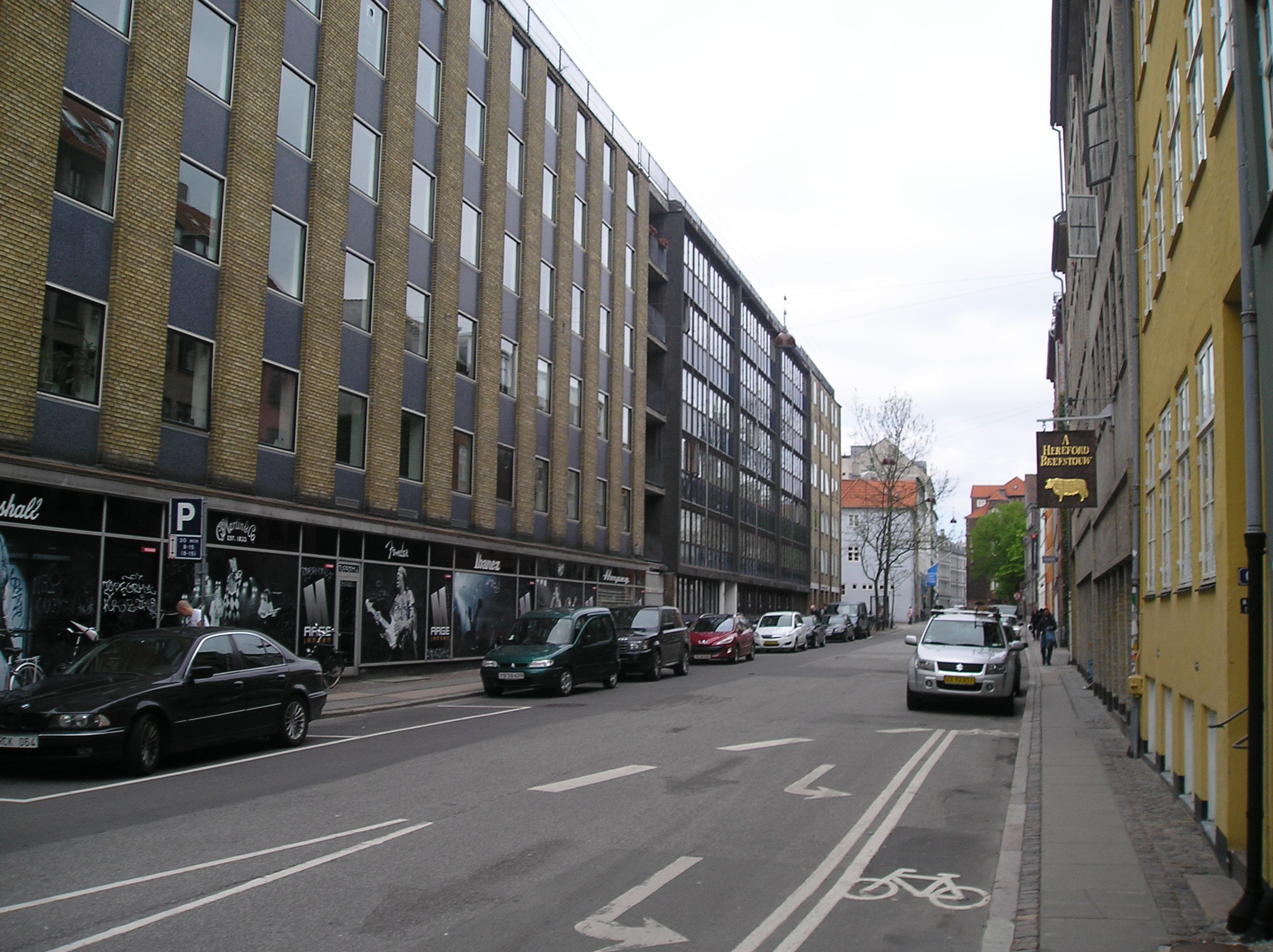 The street Åbenrå in Copenhagen.